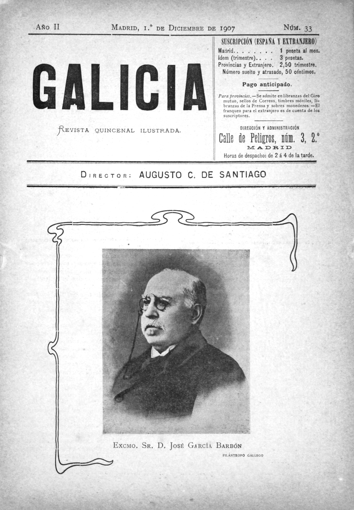 Galicia revista quincenal ilustrada - Año II Num. 33 (01121907)